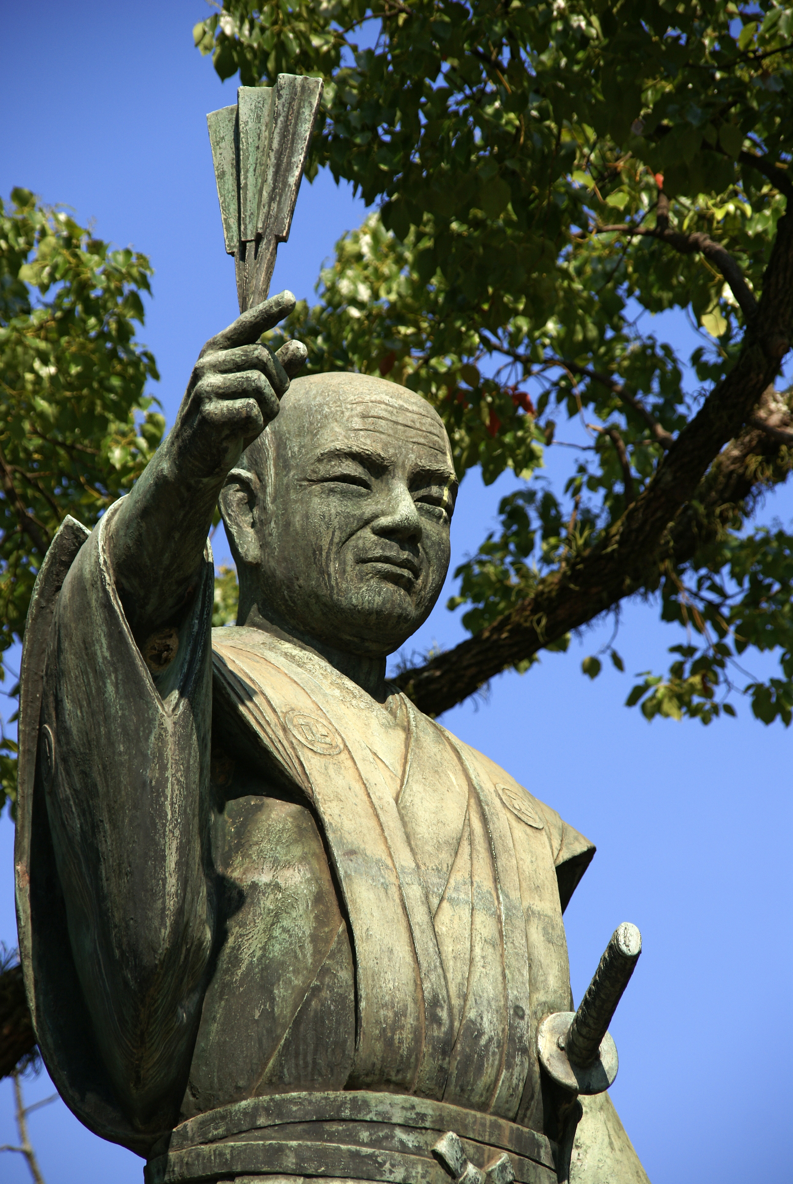 Tokushima Castle in Tokushima, Tokushima prefecture, Japan